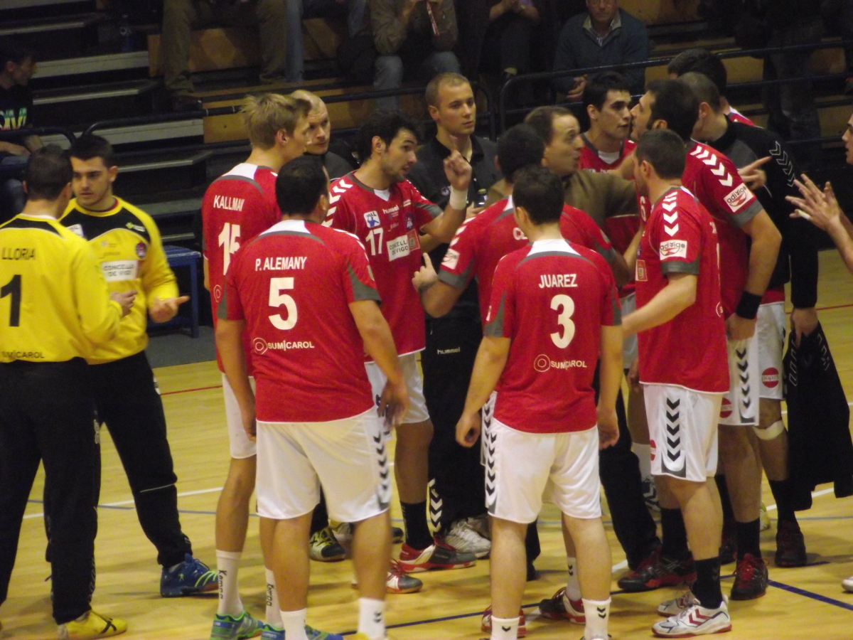 Plantel do Octavio, no Gatañal.